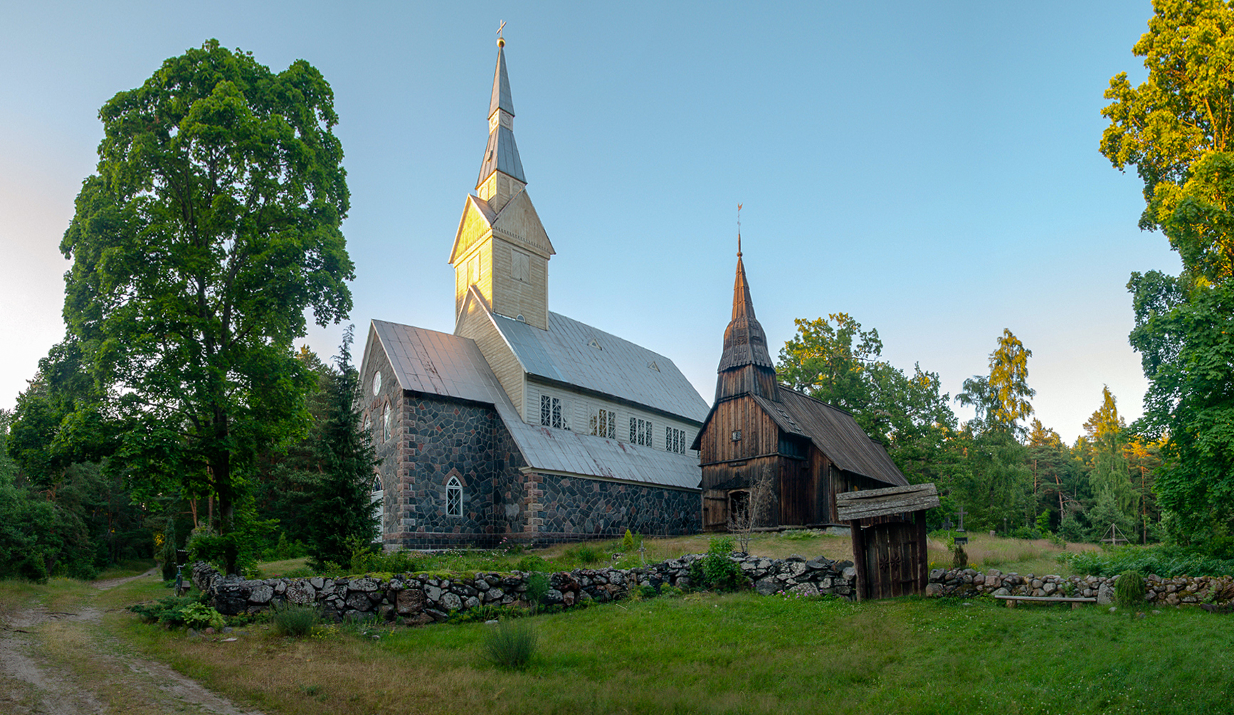 Uus ja vana kirik Ruhnus